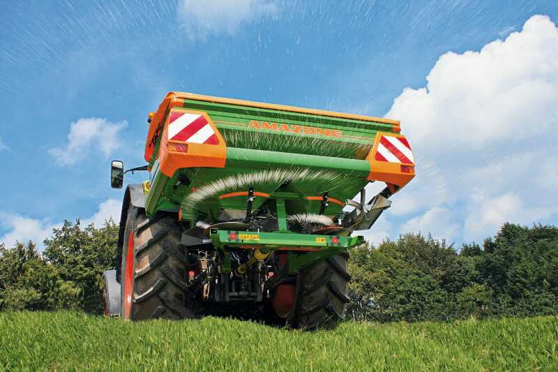 Amazone Anbau-Düngerstreuer ZA-M 1001 im Einsatz, ausgerüstet mit Safety-Set, Streubreiten bis 52 m